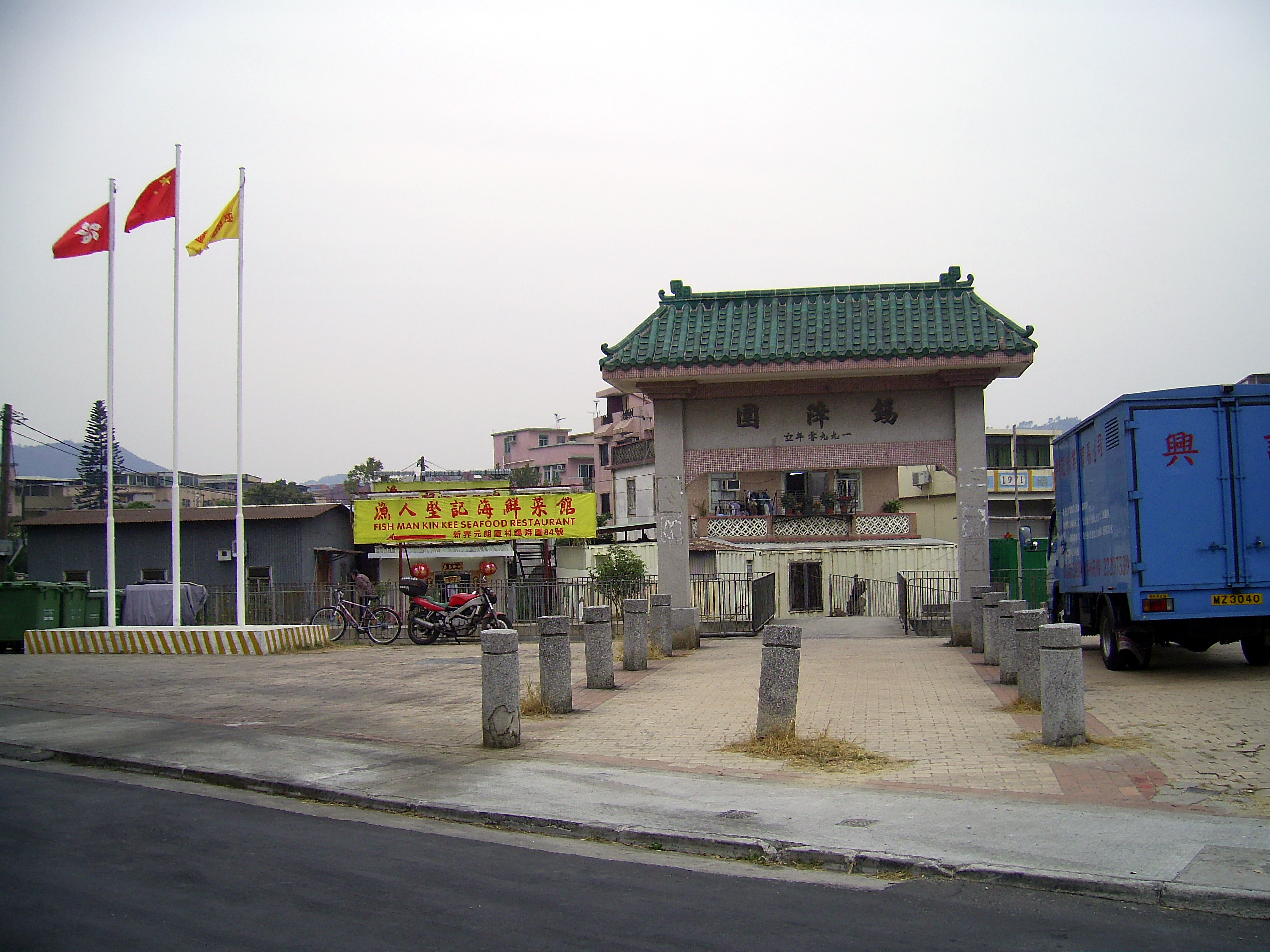 中文（香港）: 錫降圍牌坊